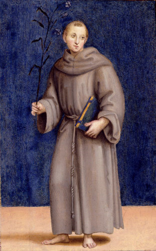 Santo Antônio de Pádua, obra de Rafael, na Dulwich Picture Gallery de Londres.